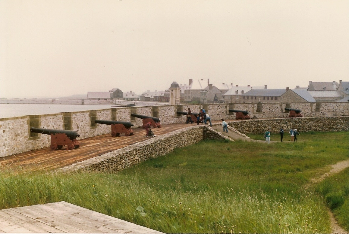 Vue sur Louisbourg